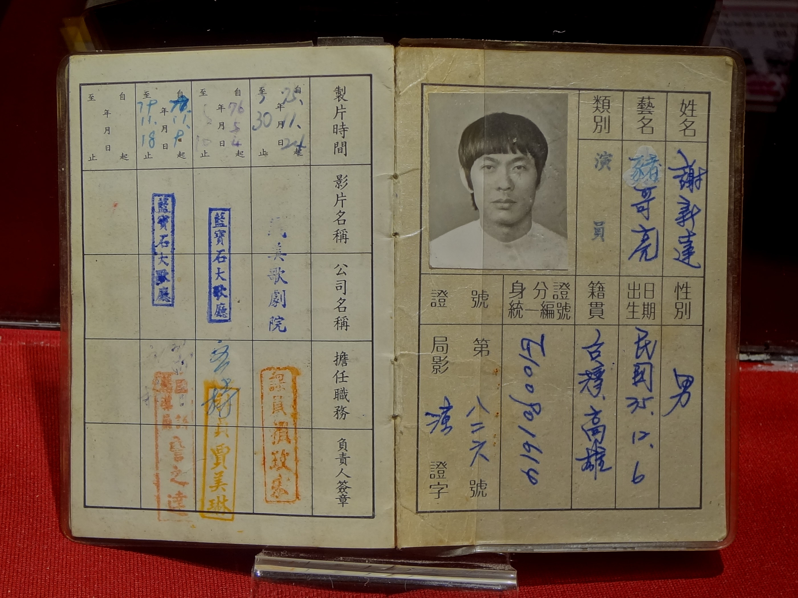 豬哥亮永恆時代展，行政院新聞局發給豬哥亮的演員證。